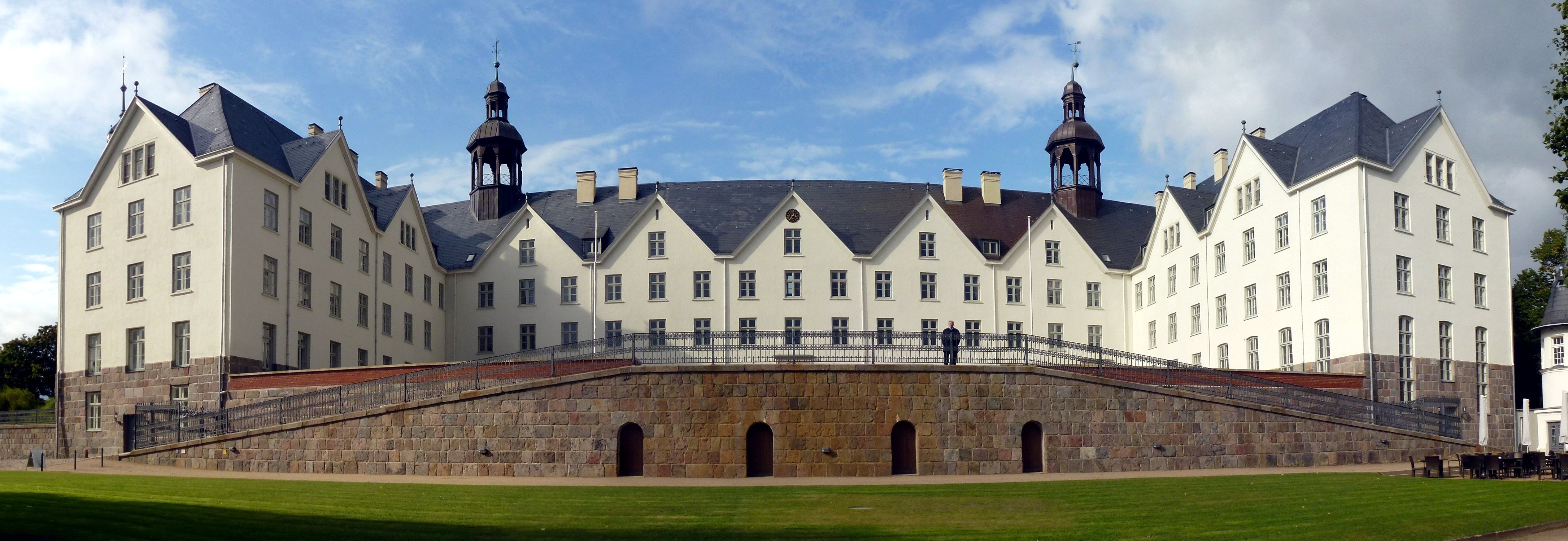 Schloss Plön Panorama, Südansicht